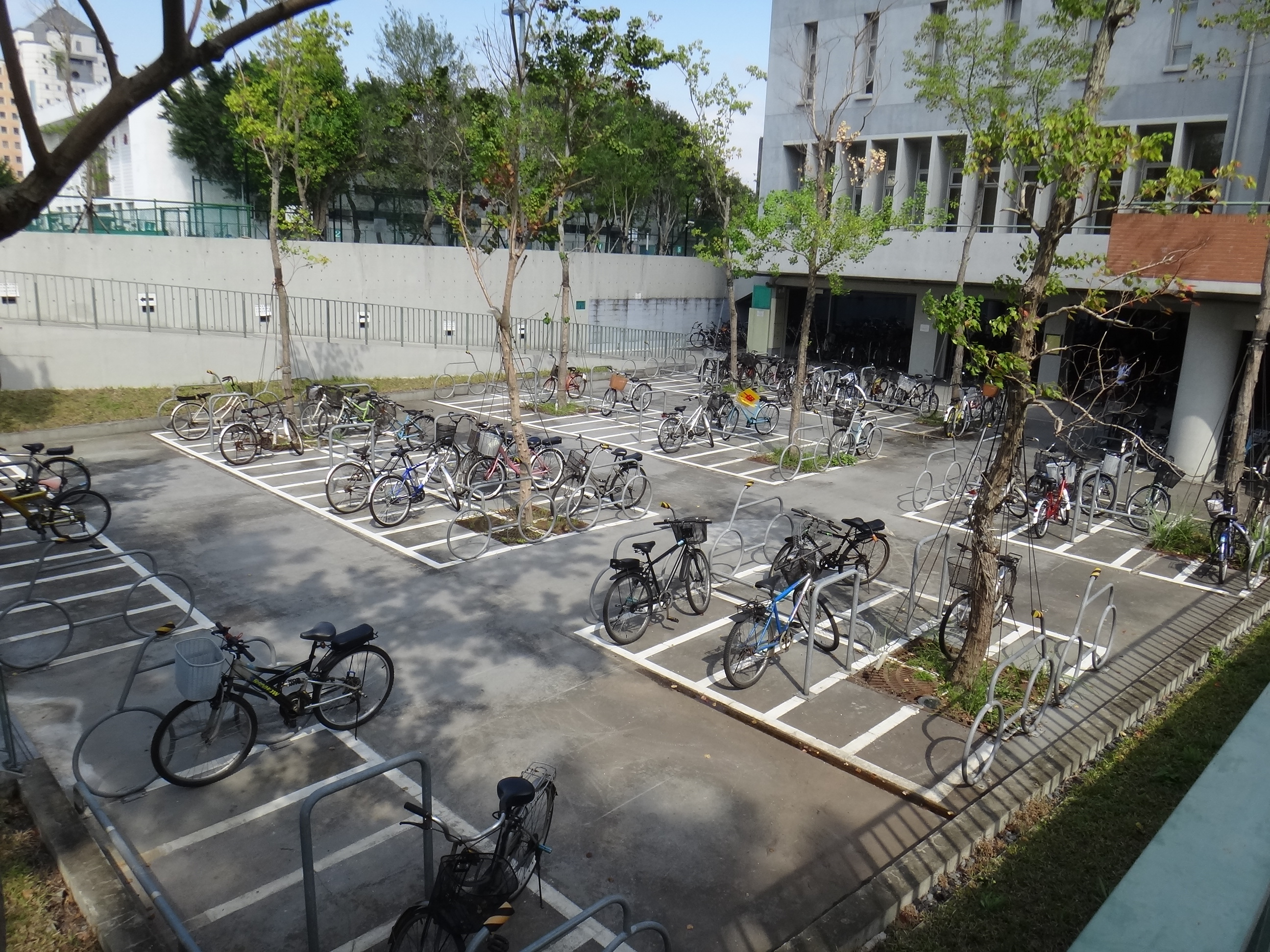 中文（台灣）: 台灣大學博雅教學館-地下室腳踏車停車場